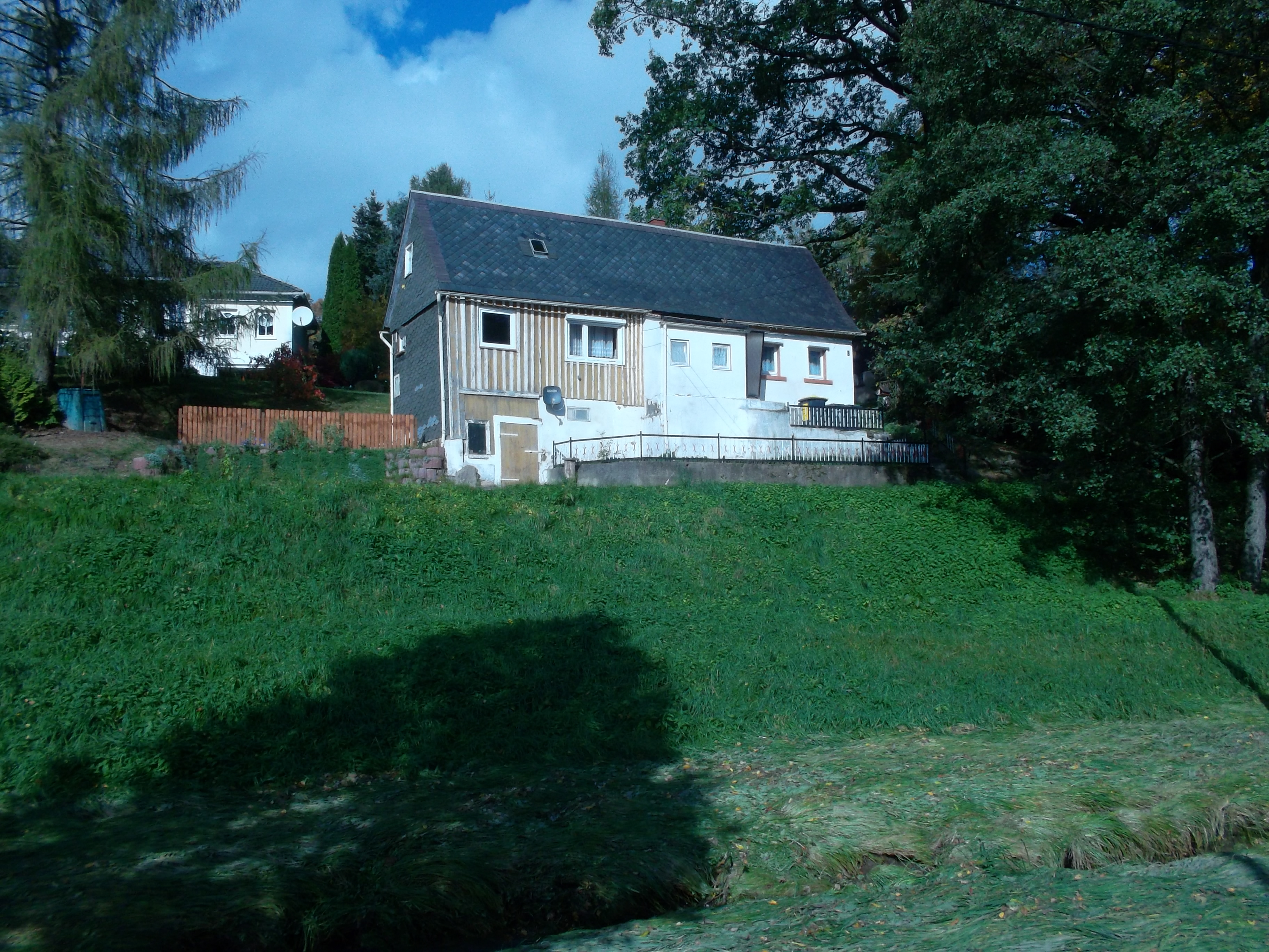 Haus am Ortsrand von Kleinpostwitz